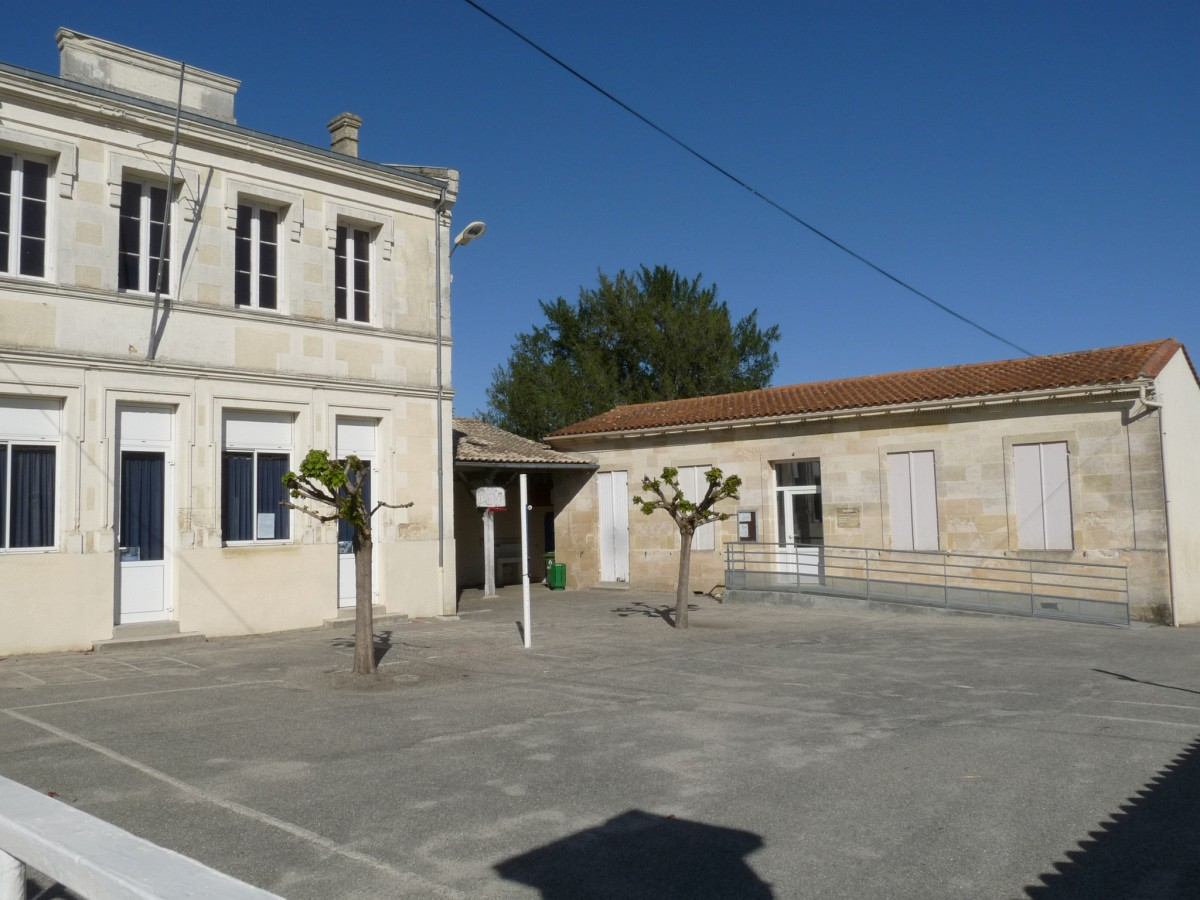 Mairie de Couquèques, Gironde, France